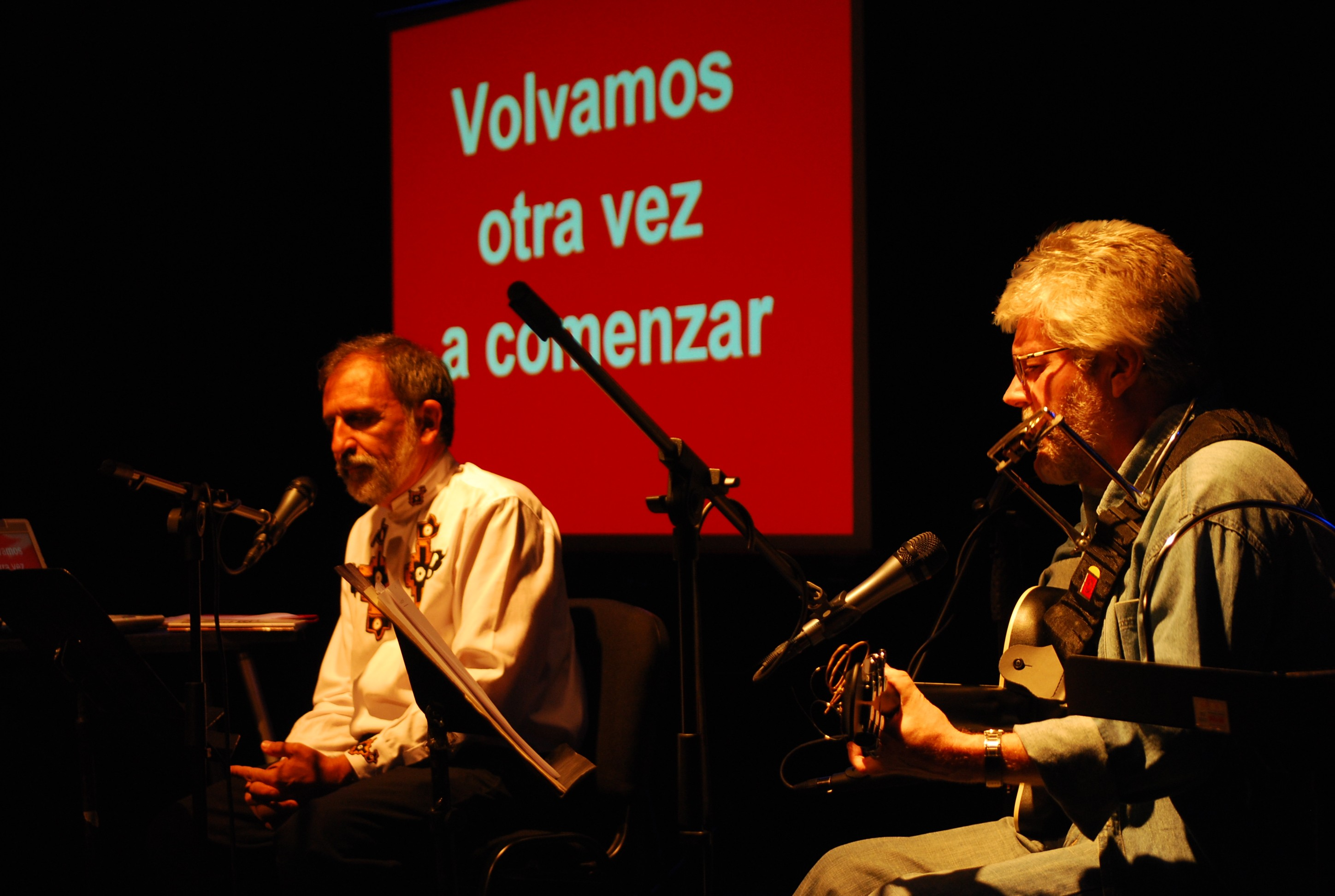 Concierto "De par en par" de Xulio Formoso y Farruco Sesto en La Universidad de las Artes (UNEARTE). Esta fotografía forma parte de una secuencia tomada el día del concierto en Caracas (Venezuela)